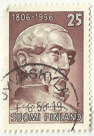 Johan Vilhelm Snellman -juhlapostimerkki 1806–1956. Leima Jyväskylä 9.6.1958.